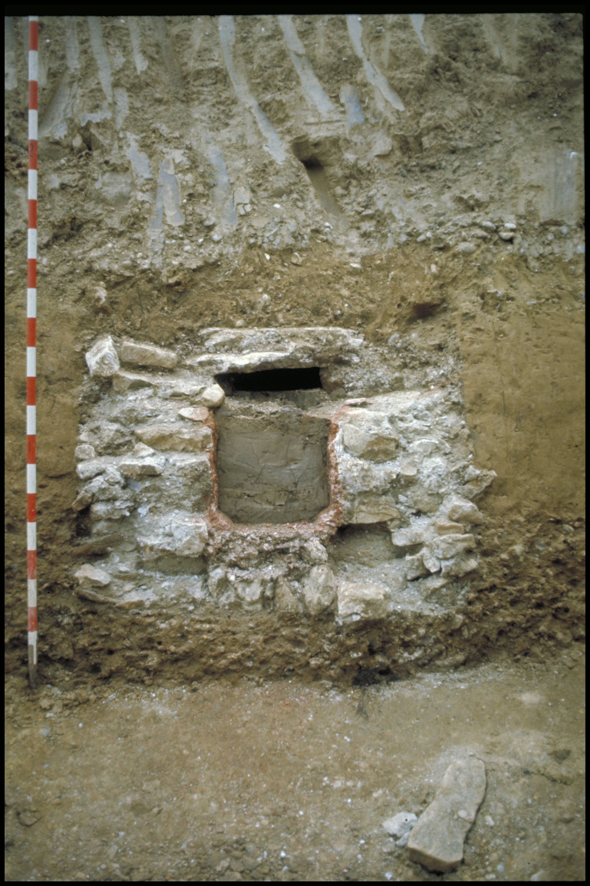 Ausgrabungen der Kantonsarchäologie Aargau Objekt: Zuleitung der toten römischen Wasserleitung von Vindonissa Ort: Hausen, Meierschulhaus Datierung: 1. Jh. n. Chr. Aufnahmedatum: Juni 1971 Anlass der Grabung: Neubau des Schulhauses in Hausen; die Leitung wurde in der ausgebaggerten Baugrube bereits weitgehend durch Baumaschinen zerstört vorgefunden; ihre Reste waren nur noch an den Baugrubenwänden erhalten. Details: Detailansicht von Nordwest auf die südöstliche Baugrubenwand mit dem geputzten Profil und der rechtwinklig zu ihrem Verlauf geschnittenen Zuleitung der toten römischen Wasserleitung. Deckplatten, Seitenwangen und Unterbau weitgehend erhalten, Kanalquerschnitt vollständig mit Schwemmlehm zugesetzt, Viertelrundstäbe erkennbar.